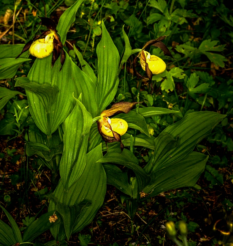 Alpengarten Villacher Alpe: Gelber Frauenschuh